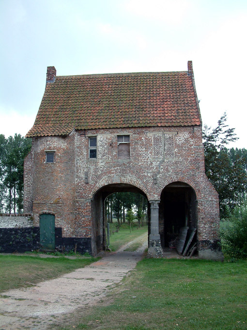 Groot Goed, beschermd monument beter bekend als "Huysmanshoeve" in Eeklo